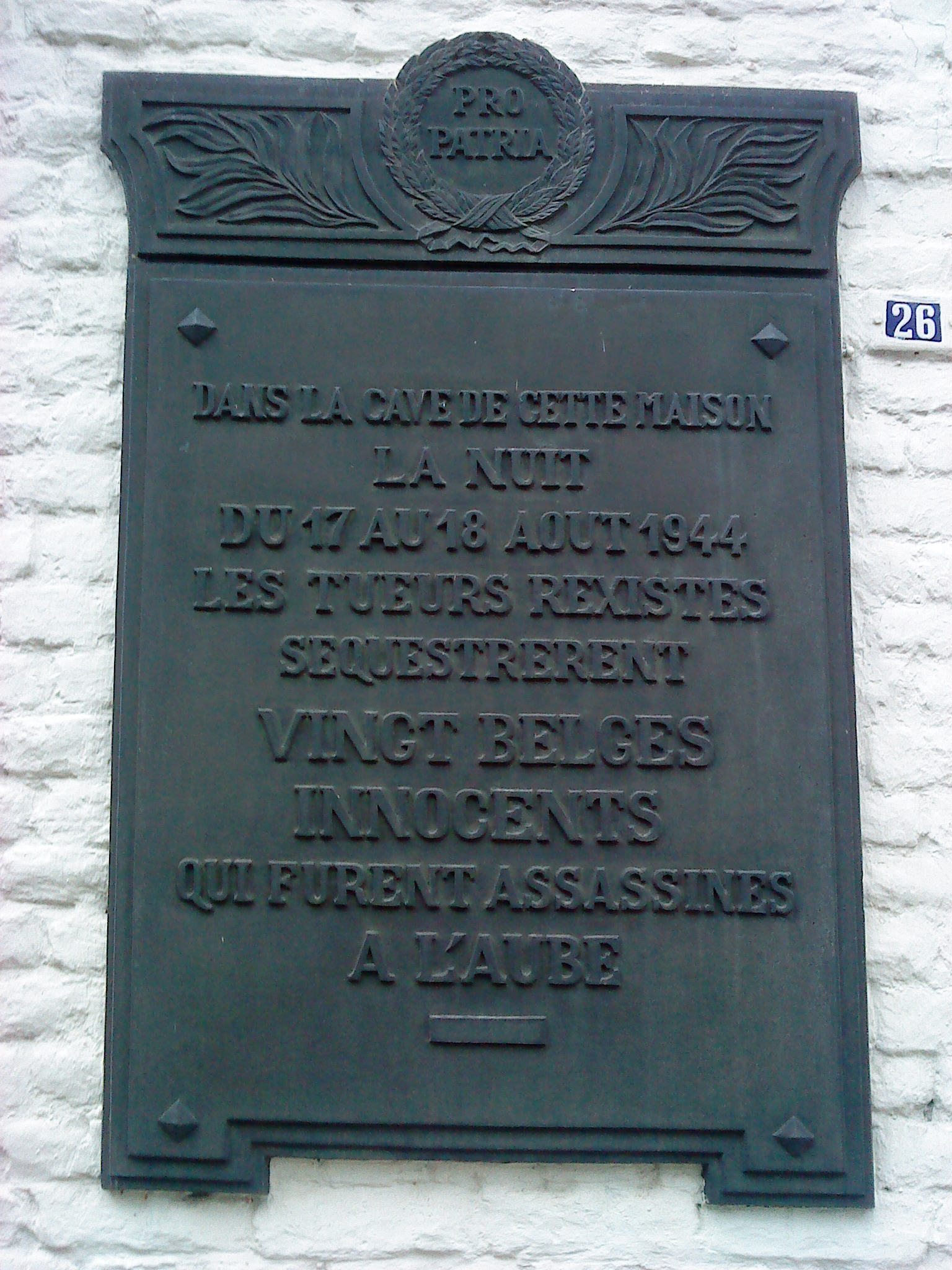 Courcelles (Belgique) - Lieu dit « Bois du Rognac » - Plaque apposée sur la maison dans la cave de la quelle furent rassemblés les victimes de la tuerie de Courcelles le 18 août 1944.